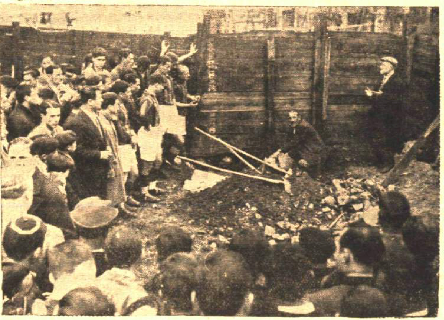 Şükrü Saracoğlu Stadium groundbreaking